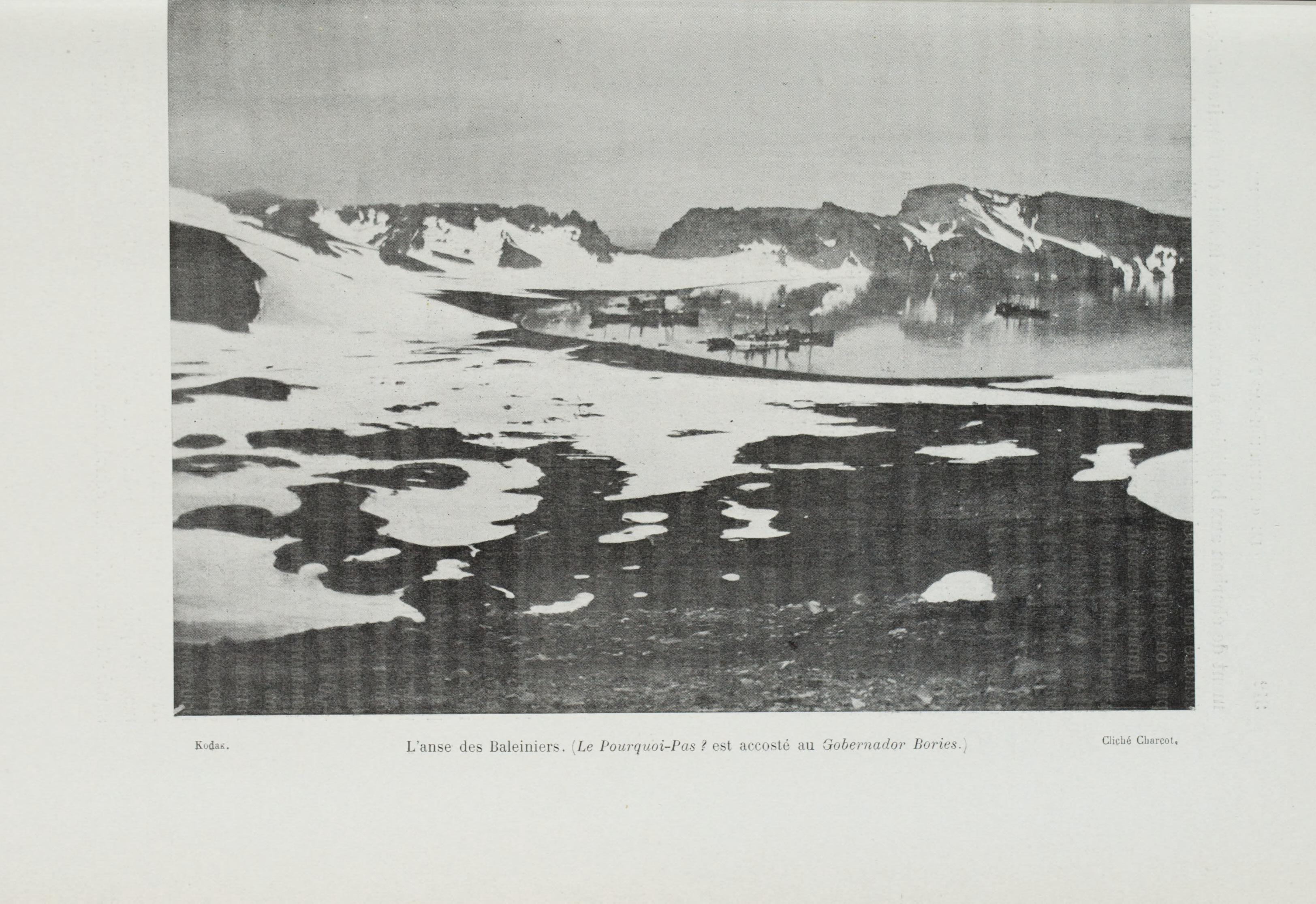 Le pourquoi-pas dans l'Antarctique : journal de la deuxieme expedition au Pole Sud, 1908-1910, suivi des rapports scientifiques des membres de letat-major preface de M. Paul Doumer.